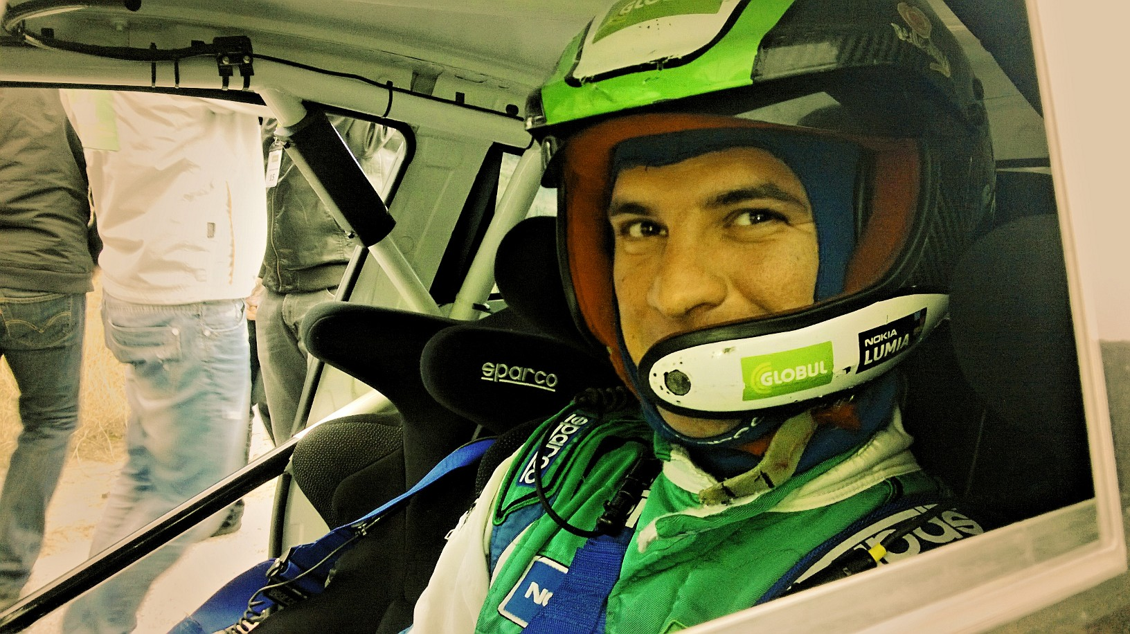 Крум Дончев е български автомобилен състезател, един от най-популярните пилоти в България. Състезава се с автомобил Ford Fiesta R5. Петкратен рали шампион на България (2003, 2004, 2009, 2010, 2011).